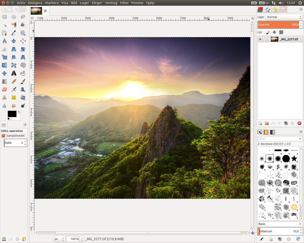 Skärmdump från GIMP 2.9.1/Ubuntu